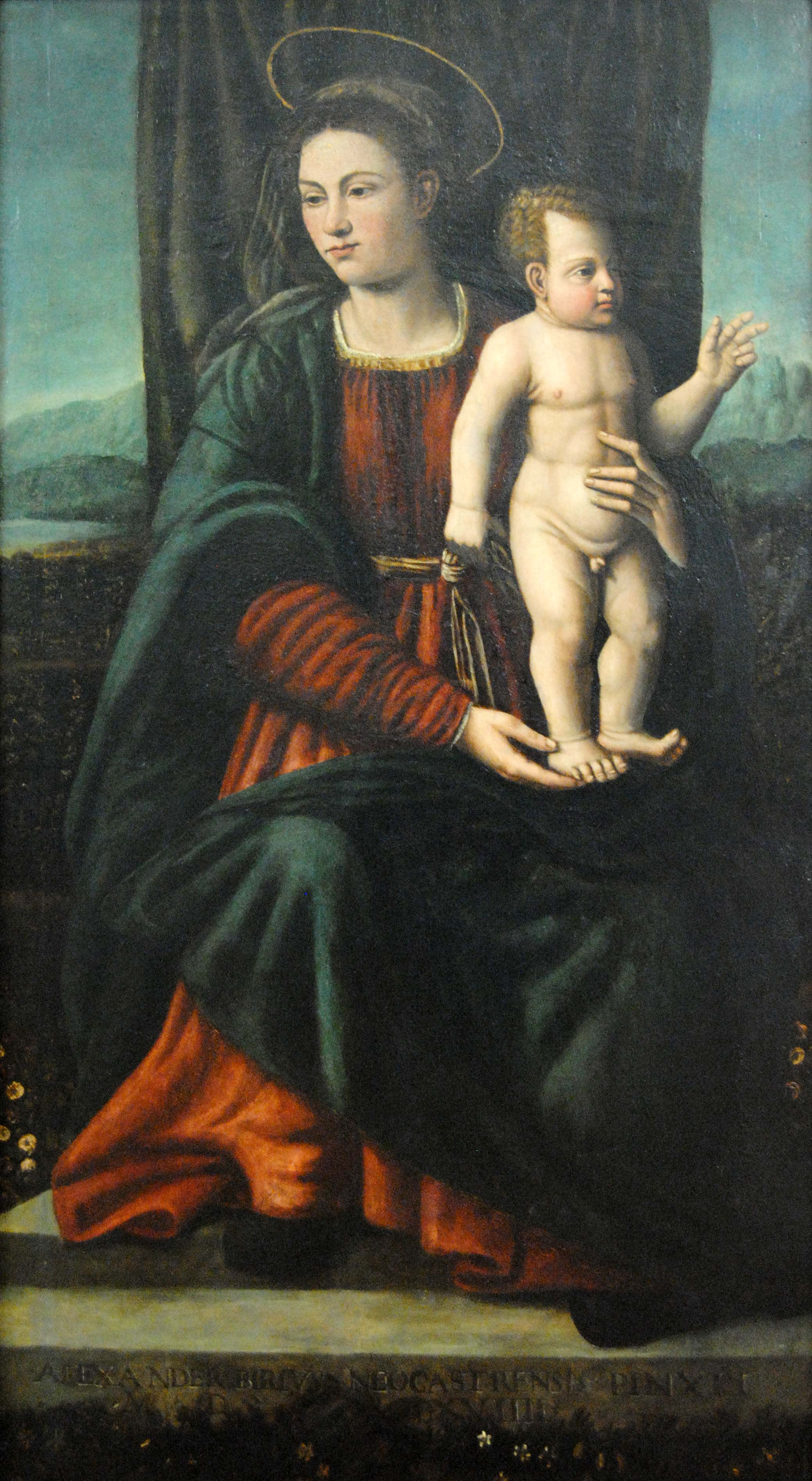 Dipinto "Madonna in trono con bambino" di Alessandro Berri 1569 attualmente custodito presso il Palazzo Comunale di Castelnuovo Scrivia